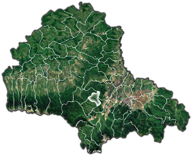 Holbav jud Brasov